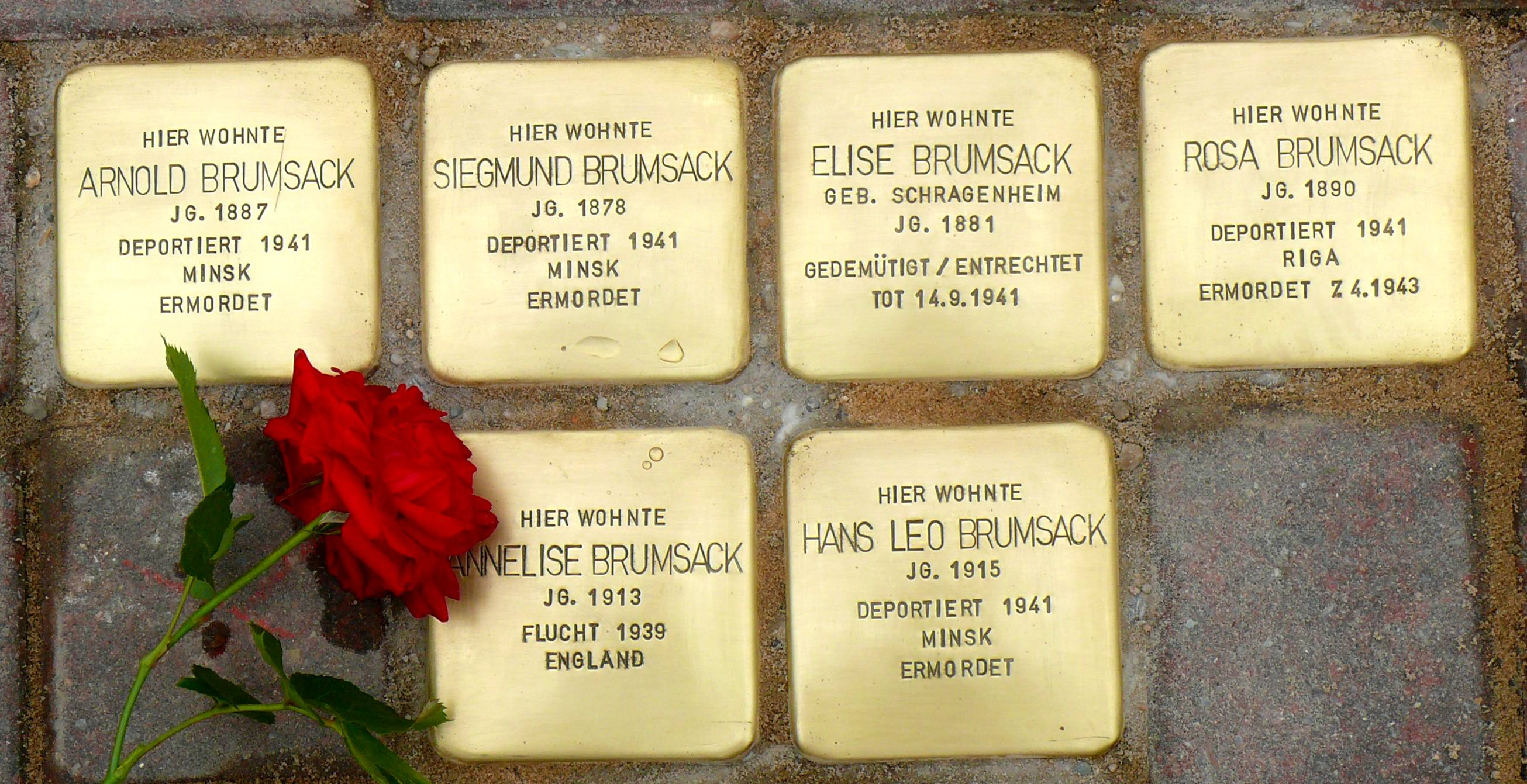 Stolpersteine in Beverstedt, verlegt am 13.6.16